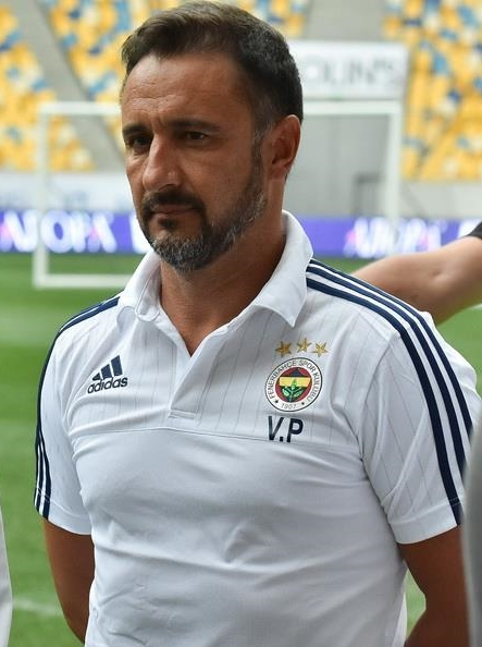 Vítor Pereira, Fenerbahçe teknik direktörü olarak, 5 Ağustos 2015 tarihindeki Şahtar Donetsk karşılaşması öncesinde.